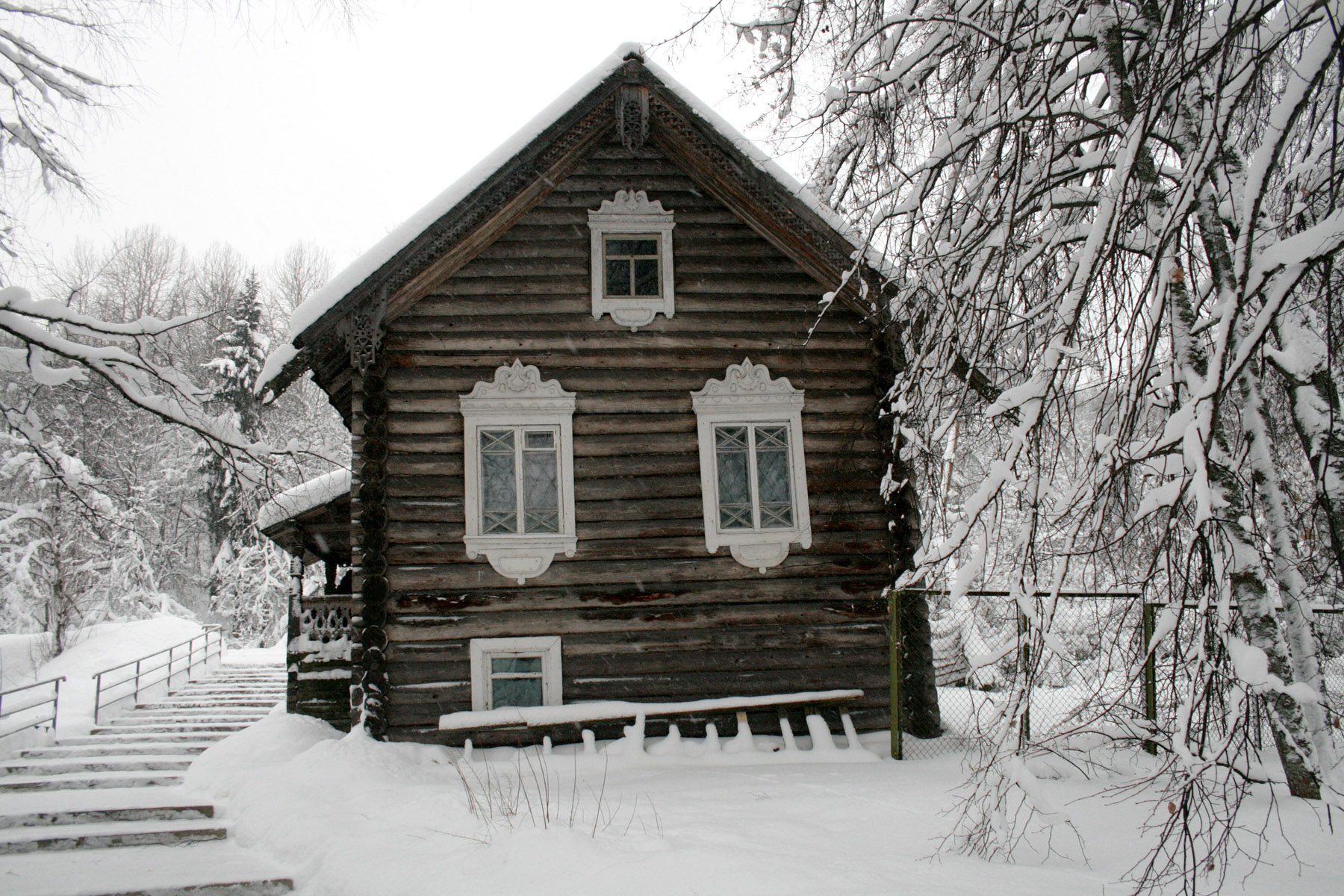 Домик смотрителя источников в котором находится музей «Марциальные воды» — филиал Национального музея Республики Карелия. Посёлок Марциальные воды.